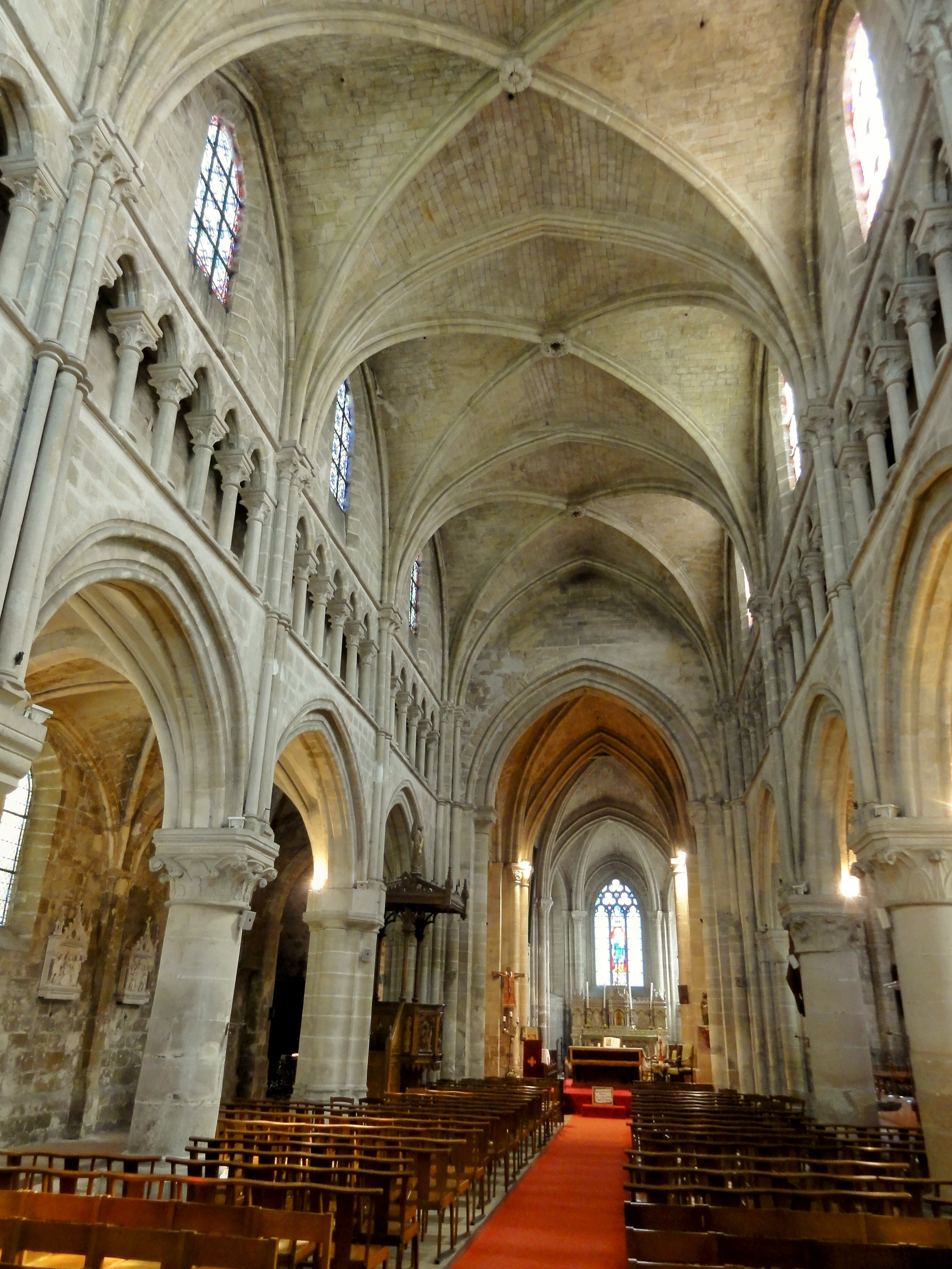 Nef, vue depuis le portail.